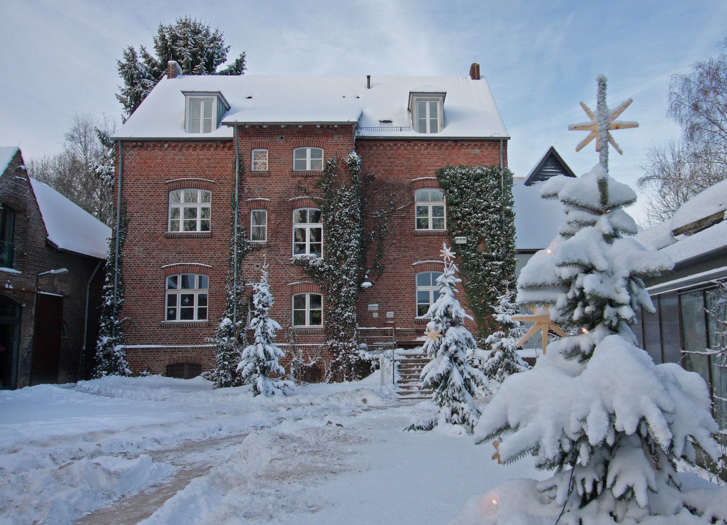 Das Bürogebäude von NaturGut Ophoven im Dezember 2009